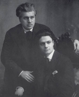 Gaetano Sgarabotto & Pietro Sgarabotto